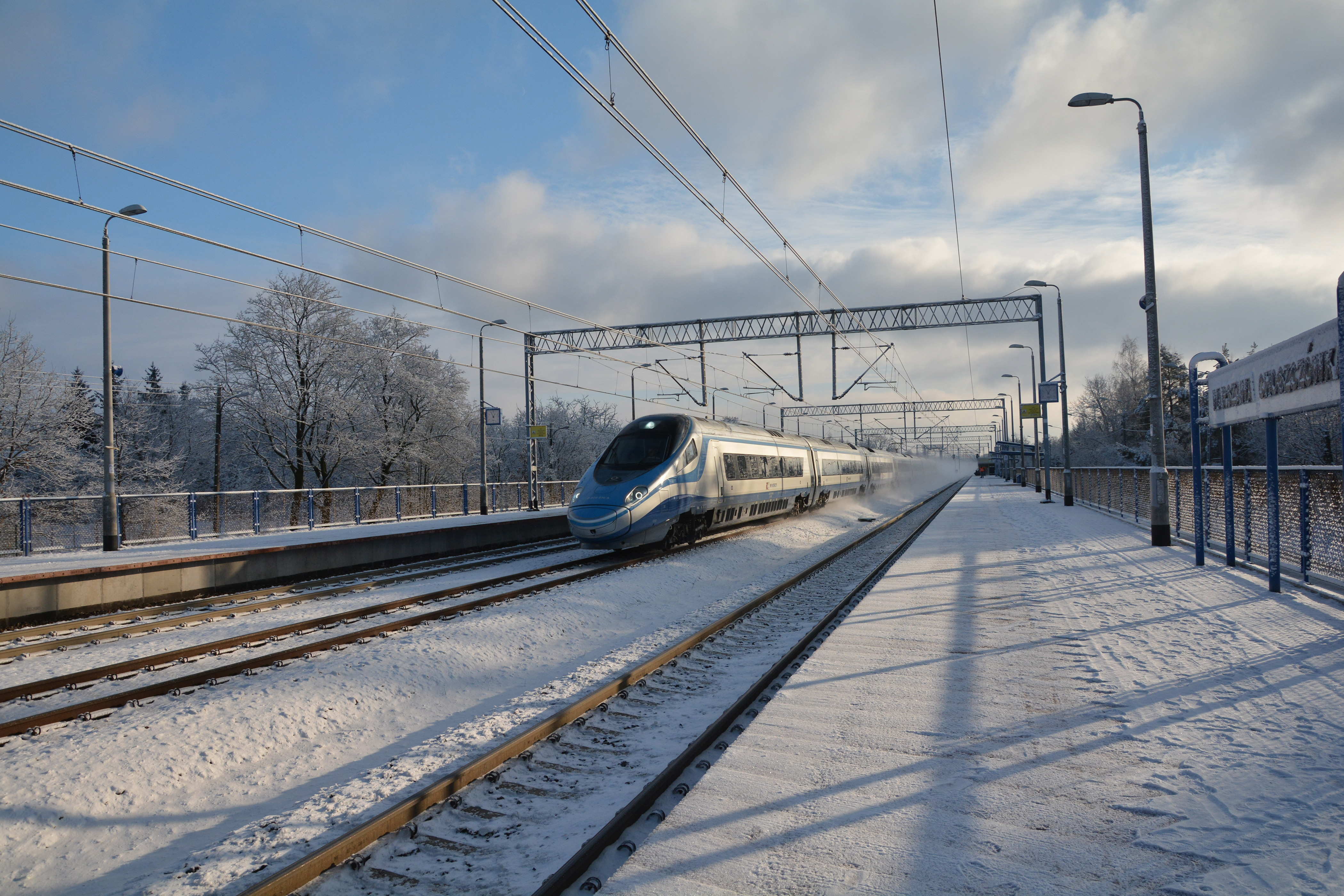 ETR 610 Pendolino jako EIP 3504 w relacji Kraków - Warszawa - Gdańsk - Gdynia przejeżdża przez stację Warszawa Choszczówka. Grudzień 2014 roku.